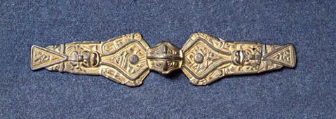 Tytärsaaren solki kansainvaellusajalta 500-luvulta